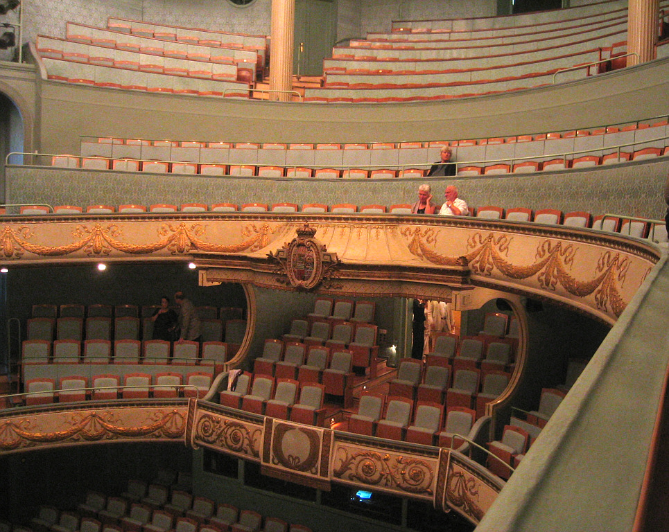 Meiningen, Germany: Staatstheater (Das Meininger Theater), Auditorium